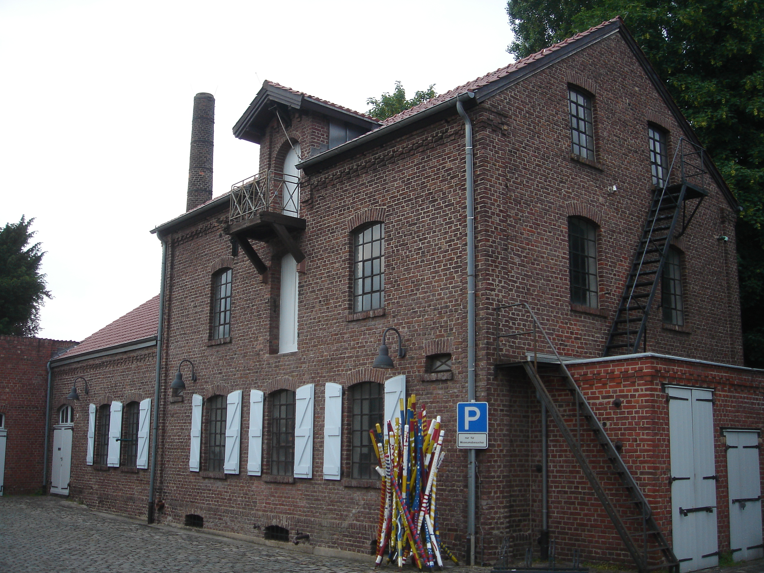 Die alte Kornbrennerei in Hilden; heute Wilhelm-Fabry-Museum im Juni 2006. This is the photograph of an architectural monument. It is part of the list of cultural monuments of Hilden, no. 25